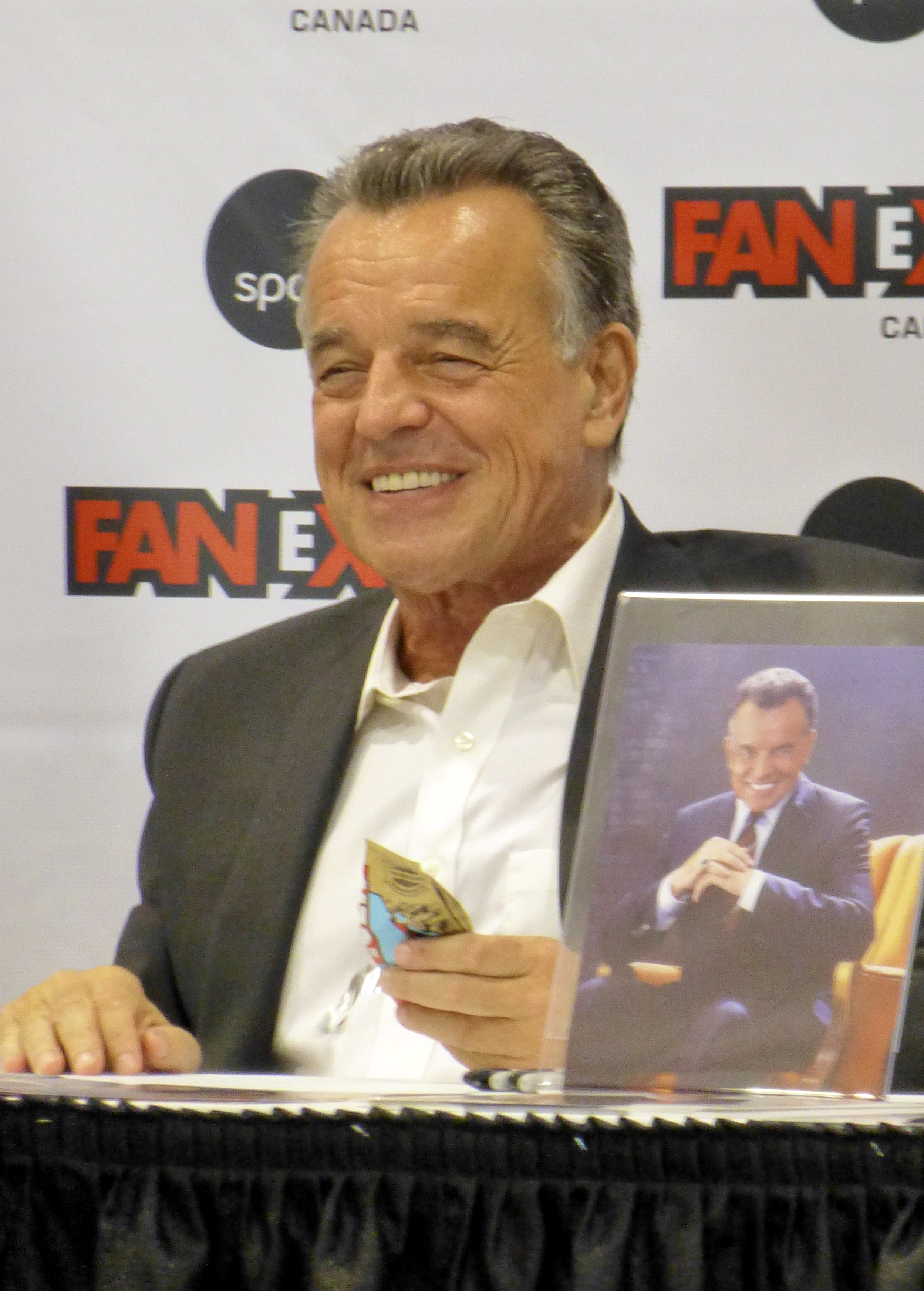 Ray Wise 01 2014 Fan Expo Canada